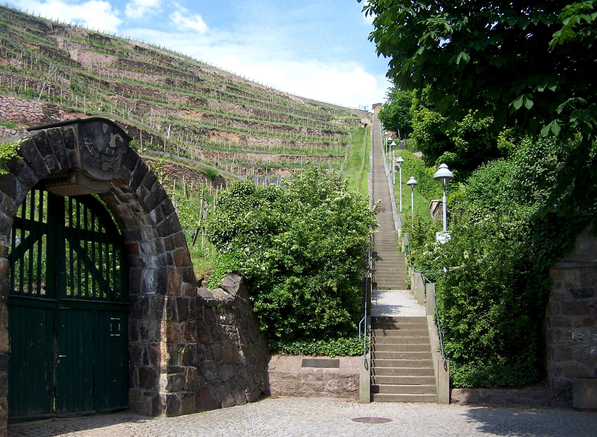 Weinbergtor zum Weinberg Goldener Wagen und Spitzhaustreppe in Radebeul, Landkreis Meißen